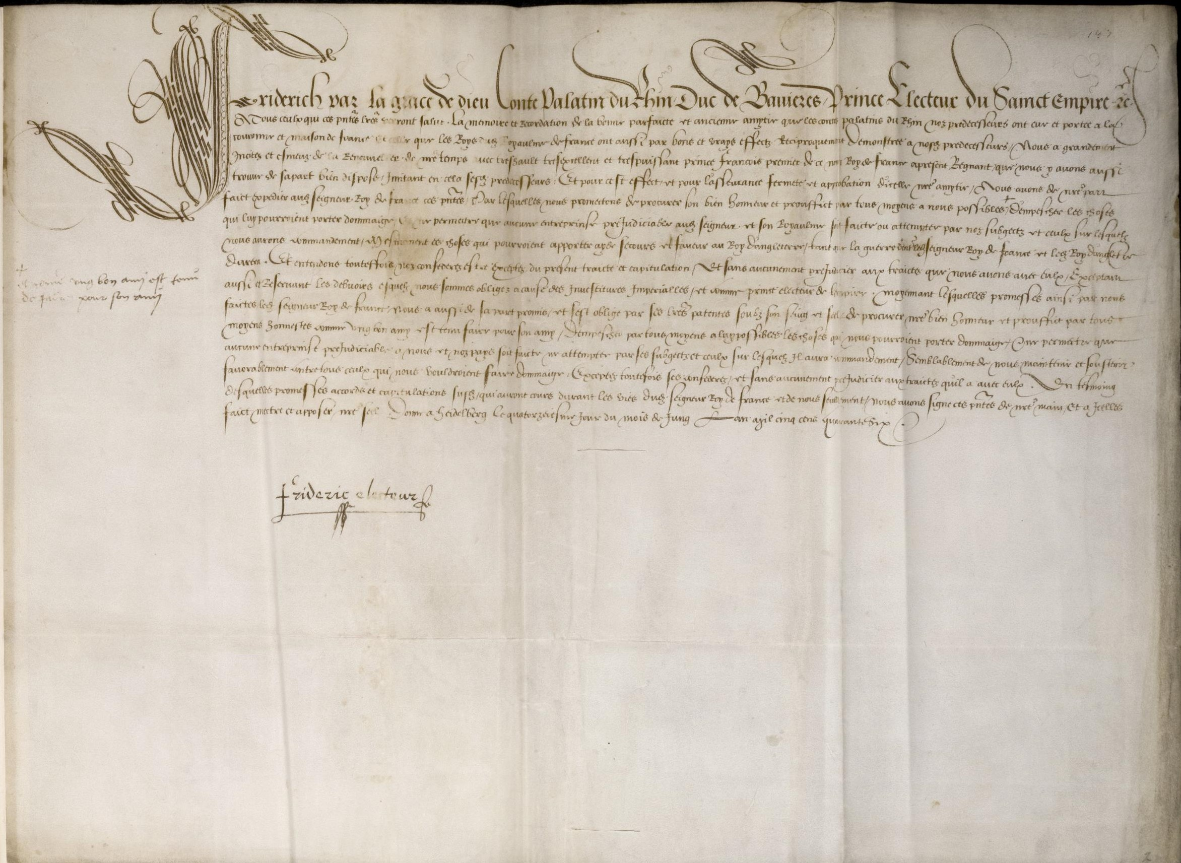 Codex Palatinus germanicus 8, Blatt 2r der Handschrift: Vertrag zwischen Kurfürst Friedrich II. von der Pfalz und König Franz I. von Frankreich (Pergamenturkunde, Heidelberg, 14. Juni 1546; eigenhändige Unterschrift Friedrichs; kein Siegel)